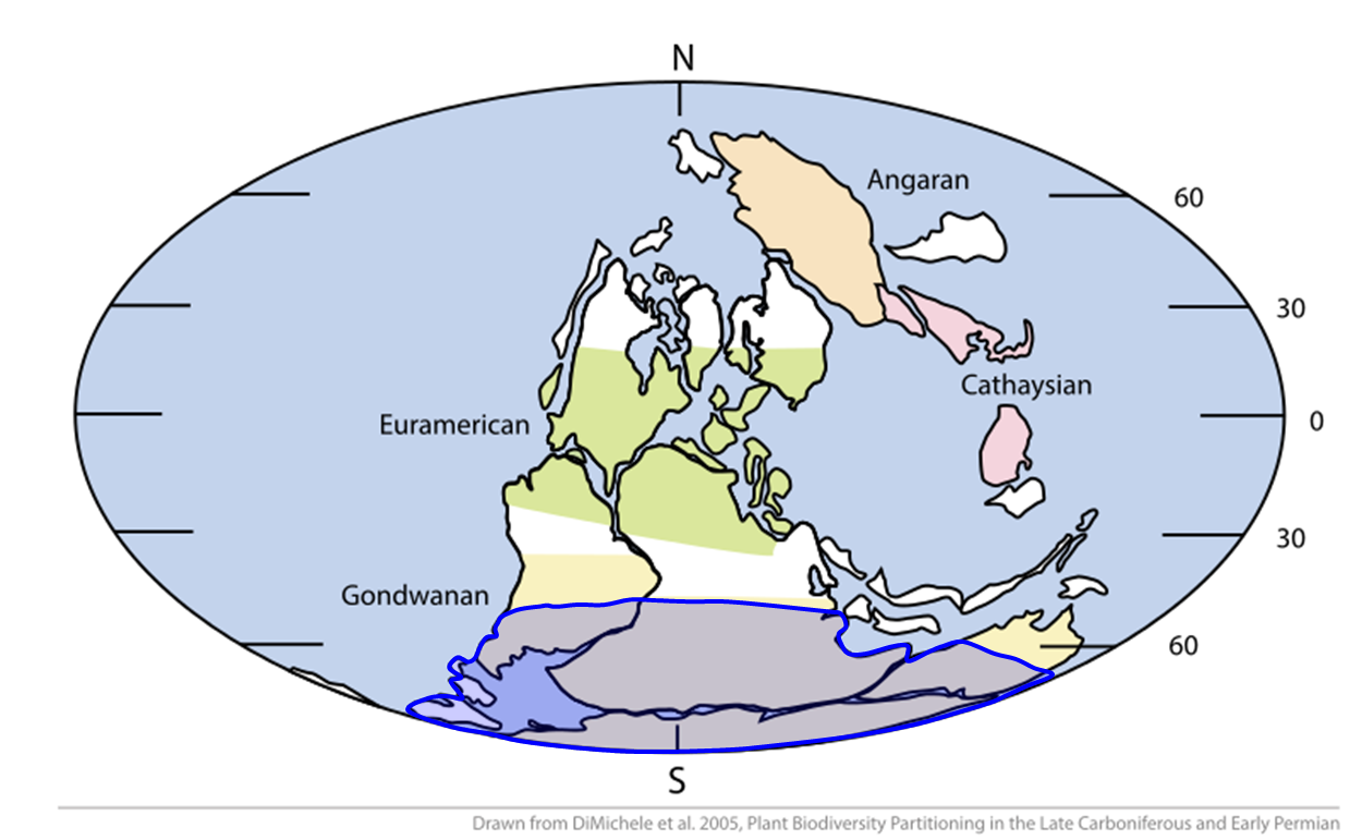 Este ficheiro foi modificado de The World of the Carboniferous-Permian boundary.svg, ficheiro existente na Wikimedia Commons e mostra os limites aproximados da Glaciação Karoo que ocorreu do Carbonífero ao Permiano do Carbonífero ao Permiano